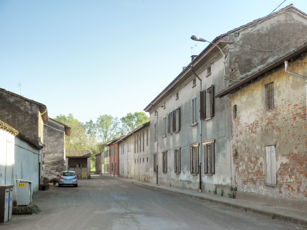 Vista di Biraga, frazione di Terranova dei Passerini.